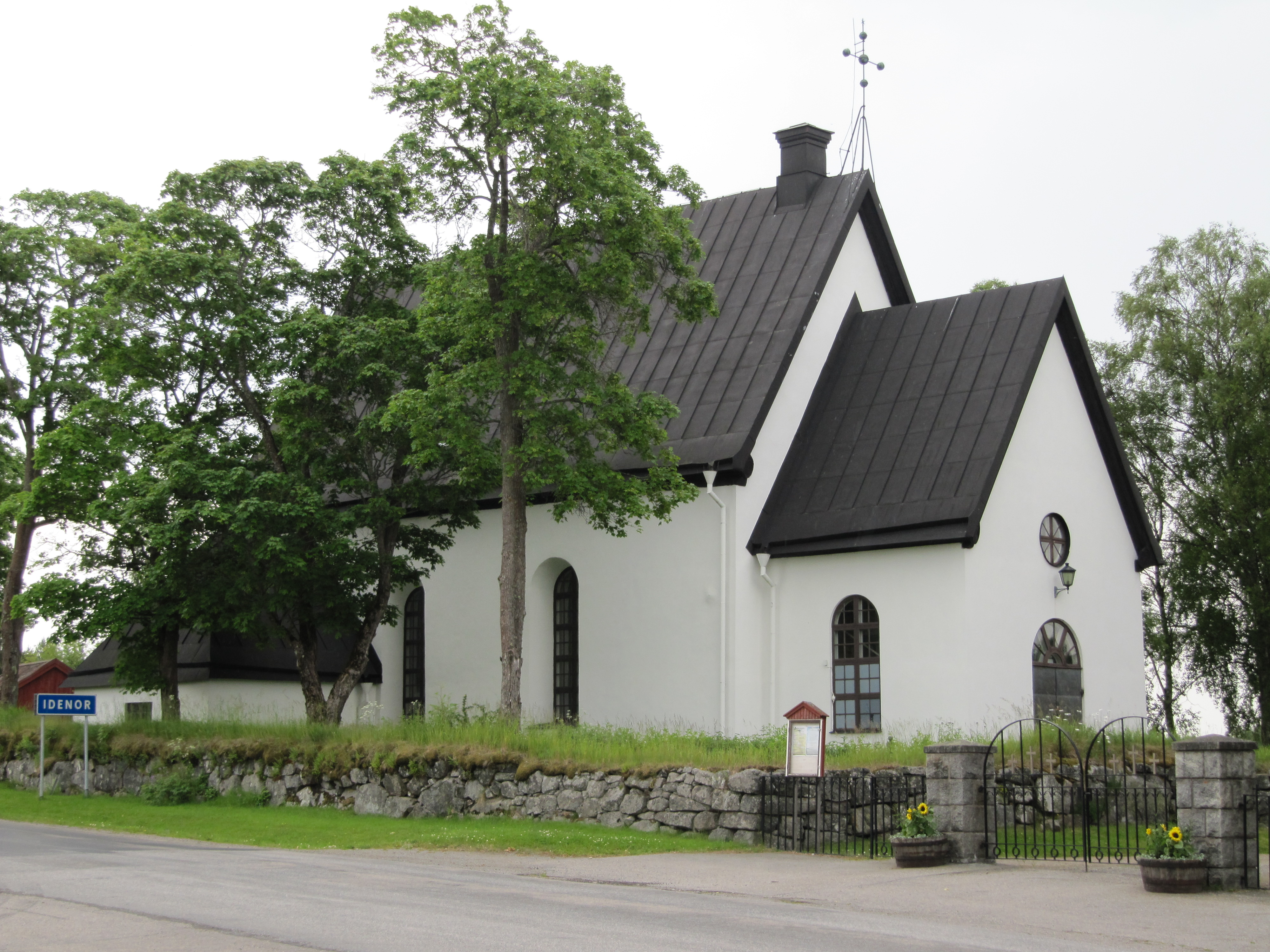 Idenors kyrka